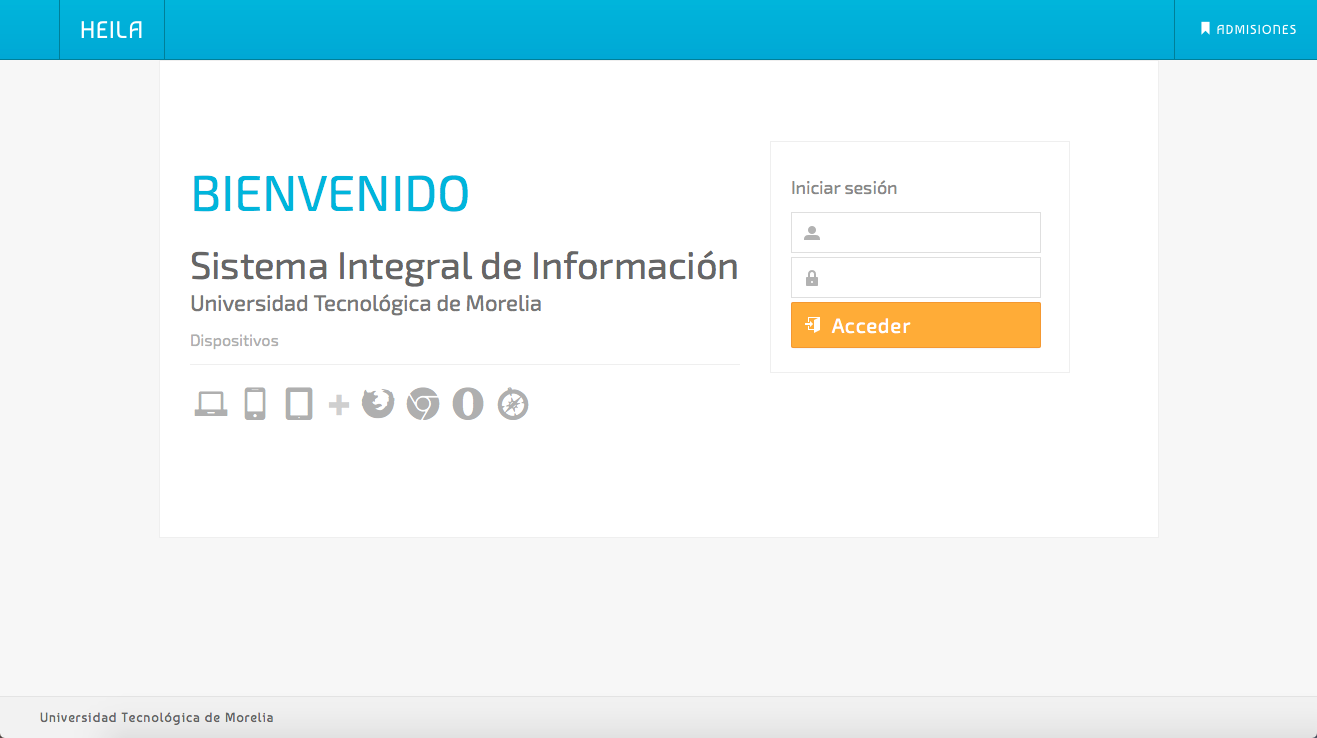 Pagina principal de Heila